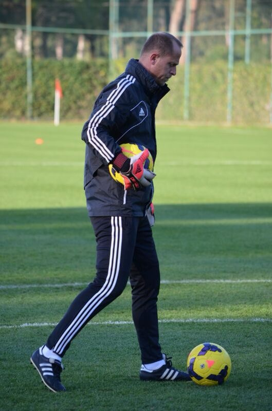 Recep Atılgan